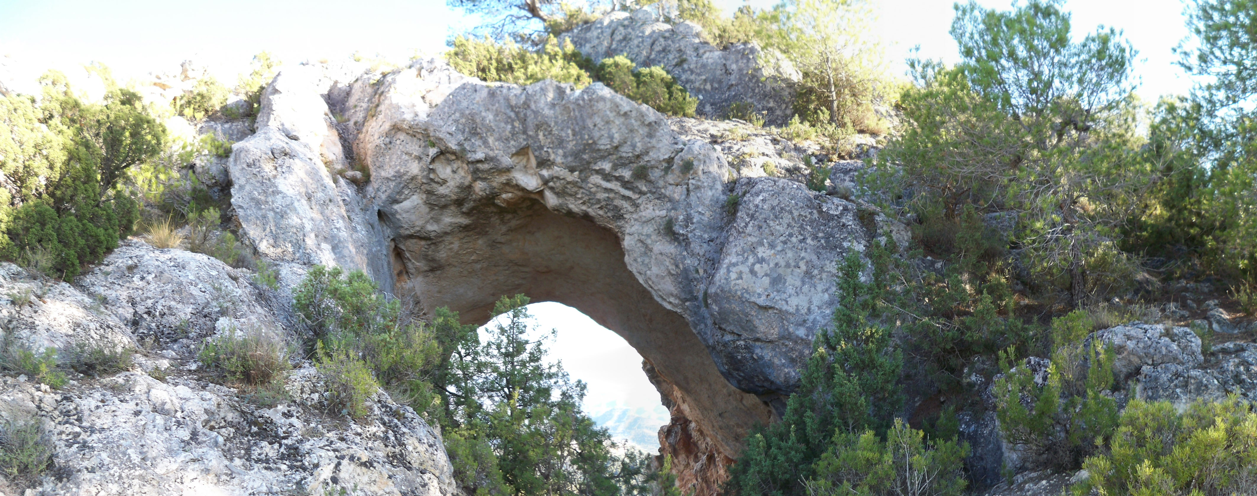 "El Bujero" Monumento natural del municipio de Molinicos (Albacete). Desde este lugar se divisan la sierra del Cujón y el valle del río Tus. Se trata de una roca atravesada por la naturaleza.